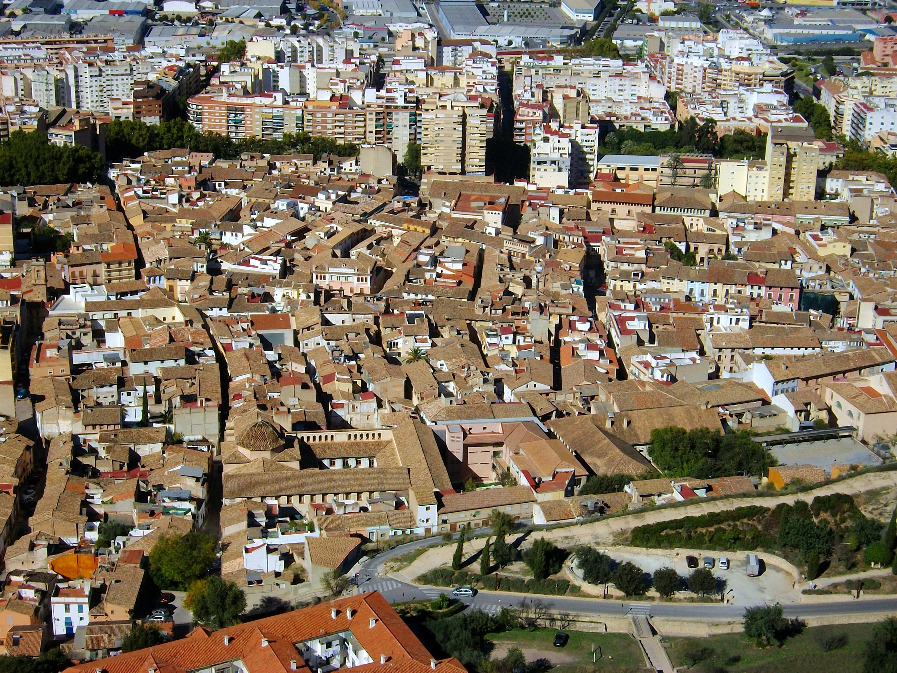 Xàtiva des del Castell.